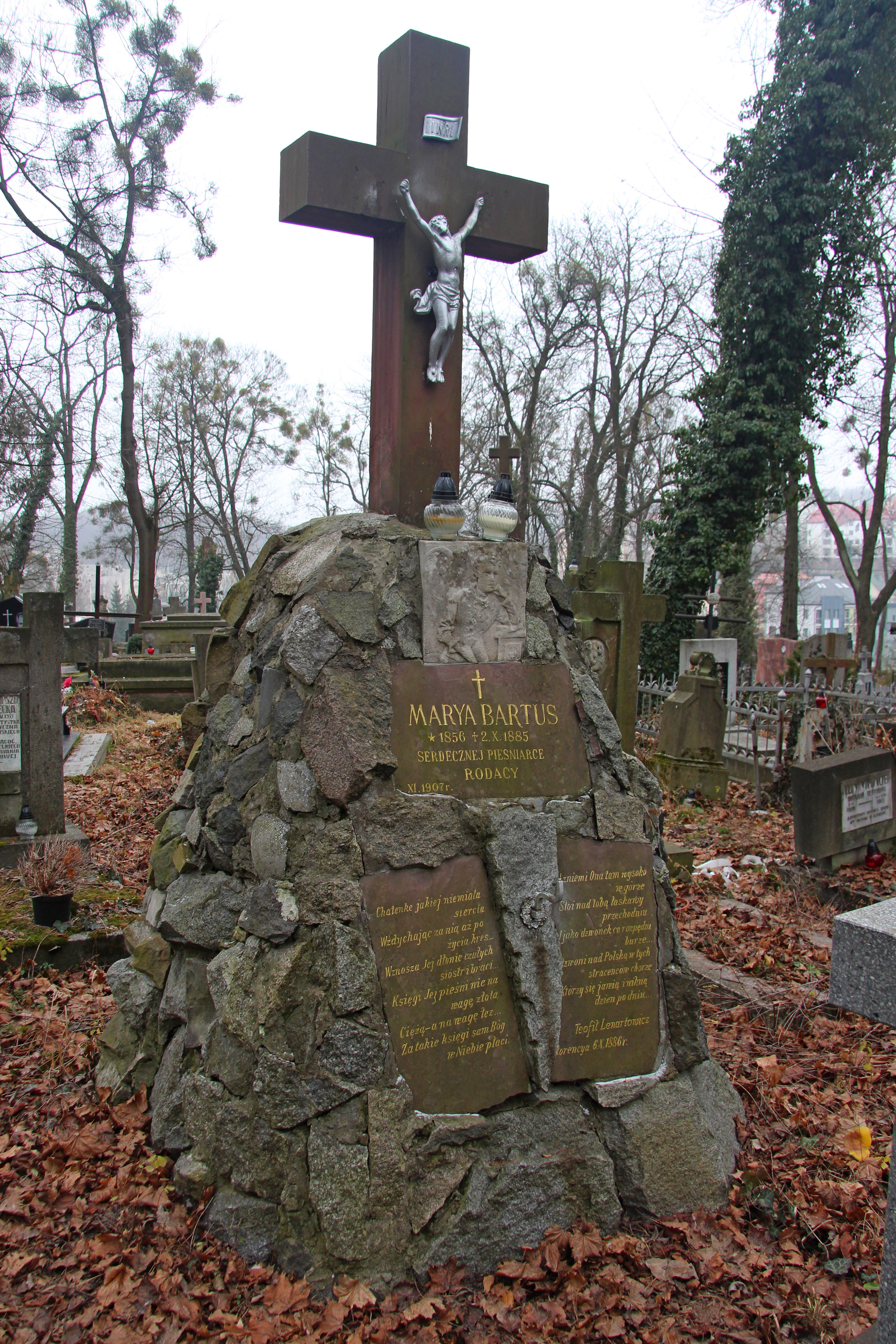 Пам'ятник на могилі М. Бартус.Личаківський цвинтар , поле № 53.